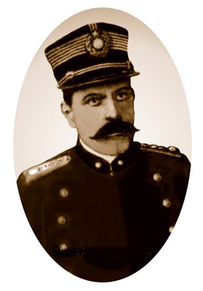 Alorino Machado de Lucena